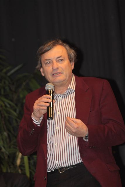 Oliviero Beha (Firenze, 14 gennaio 1949) è un giornalista, scrittore, saggista, conduttore televisivo e conduttore radiofonico italiano.